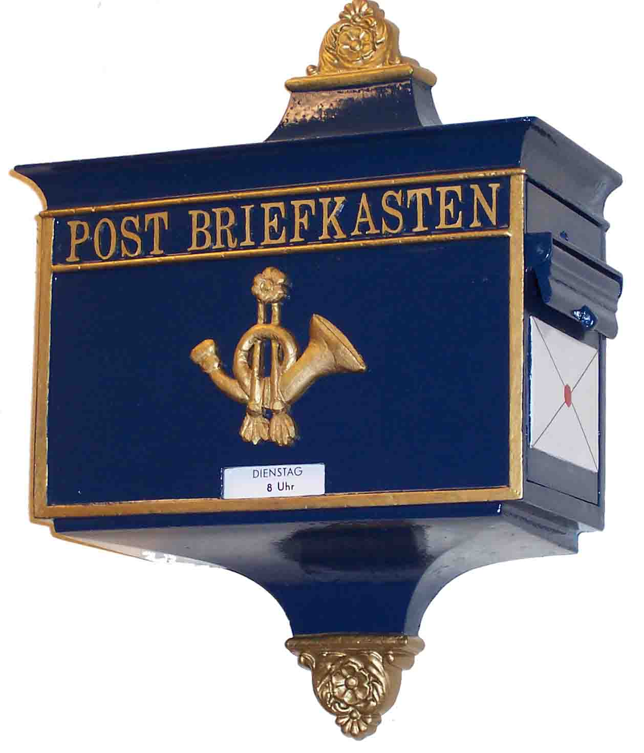 alter Post-Briefkasten aus der Zeit der Reichspost auf der rechten Bildseite befindet sich die Entnahmeklappe für die Briefe (momentan zu) Aufnahmeort: Rheinhessisches Postmuseum in Erbes-Büdesheim, Deutschland